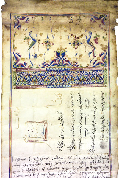 1657. მეფე როსტომის წყალობის სიგელი სოლაღაშვილებისადმი